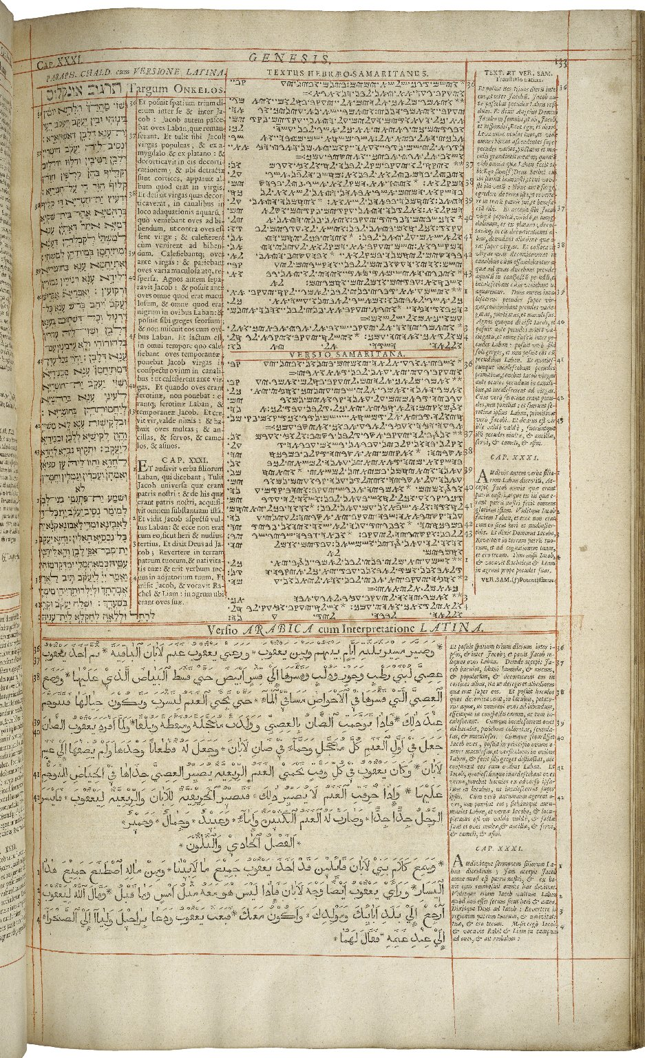 Страница с текстом Книги Бытия (гл. 31) Лондонской Полиглотты